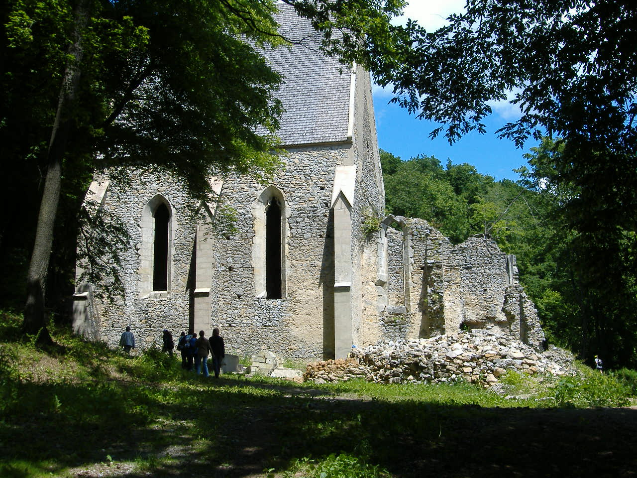 A martonyi kolostorrom (Borsod-Abaúj-Zemplén megye)